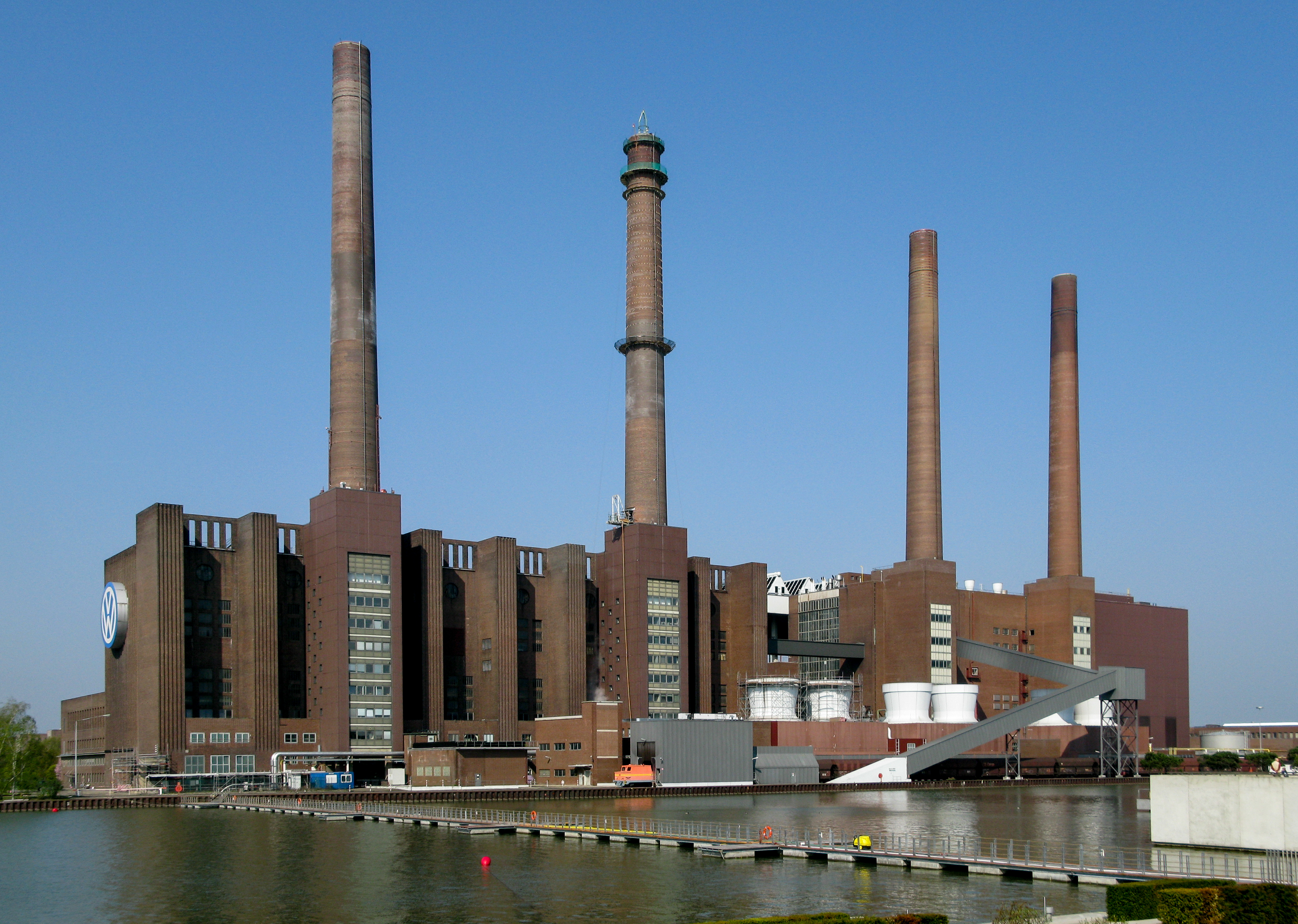 Heizkraftwerk Wolfsburg Nord (Teil des Volkswagenwerks) This is a photograph of an architectural monument.It is on the list of cultural monuments of Wolfsburg